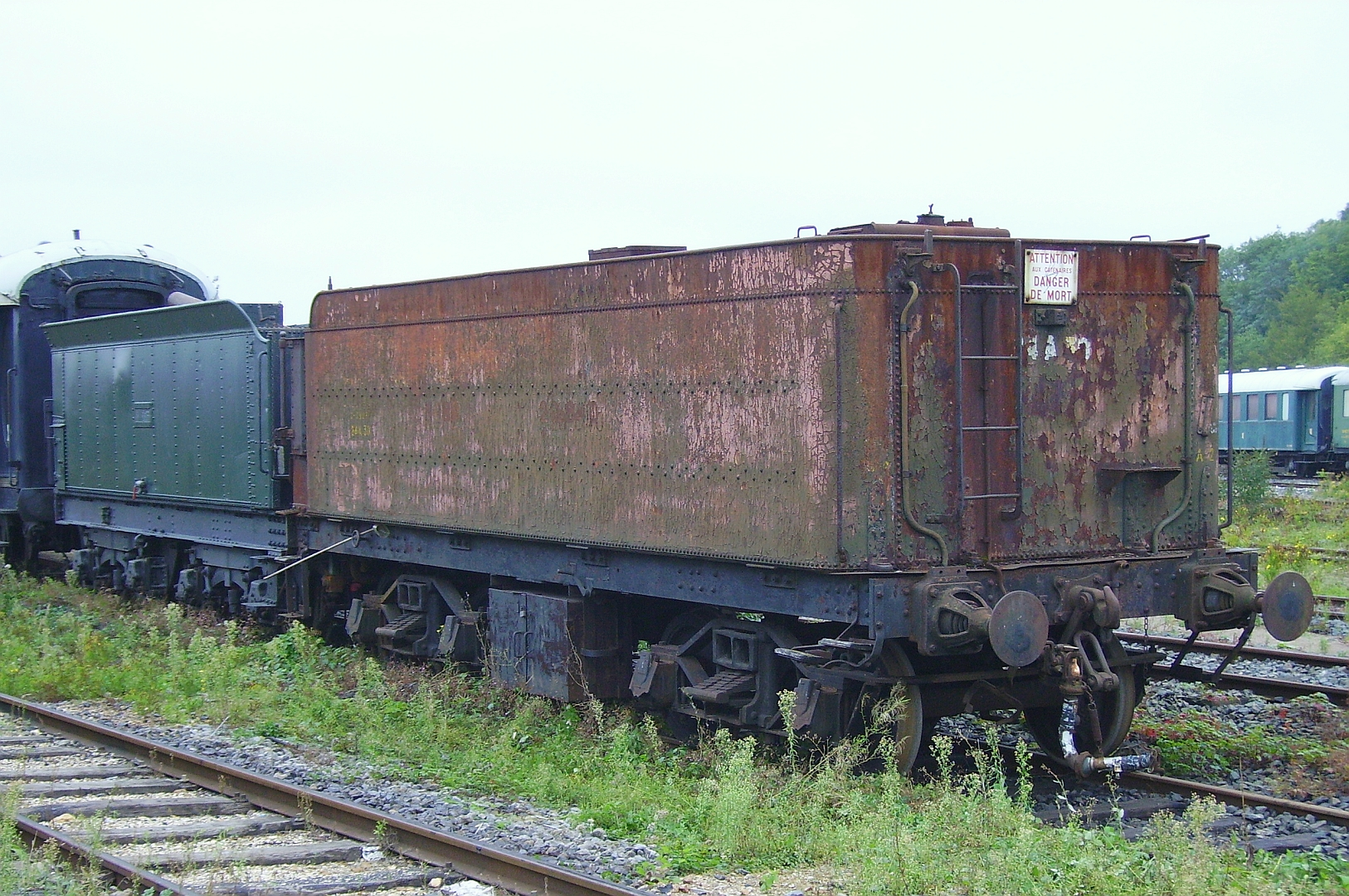 Les tenders 24 A 30 et 18 B 579 au dépôt de Longueville le 16 septembre 2006.